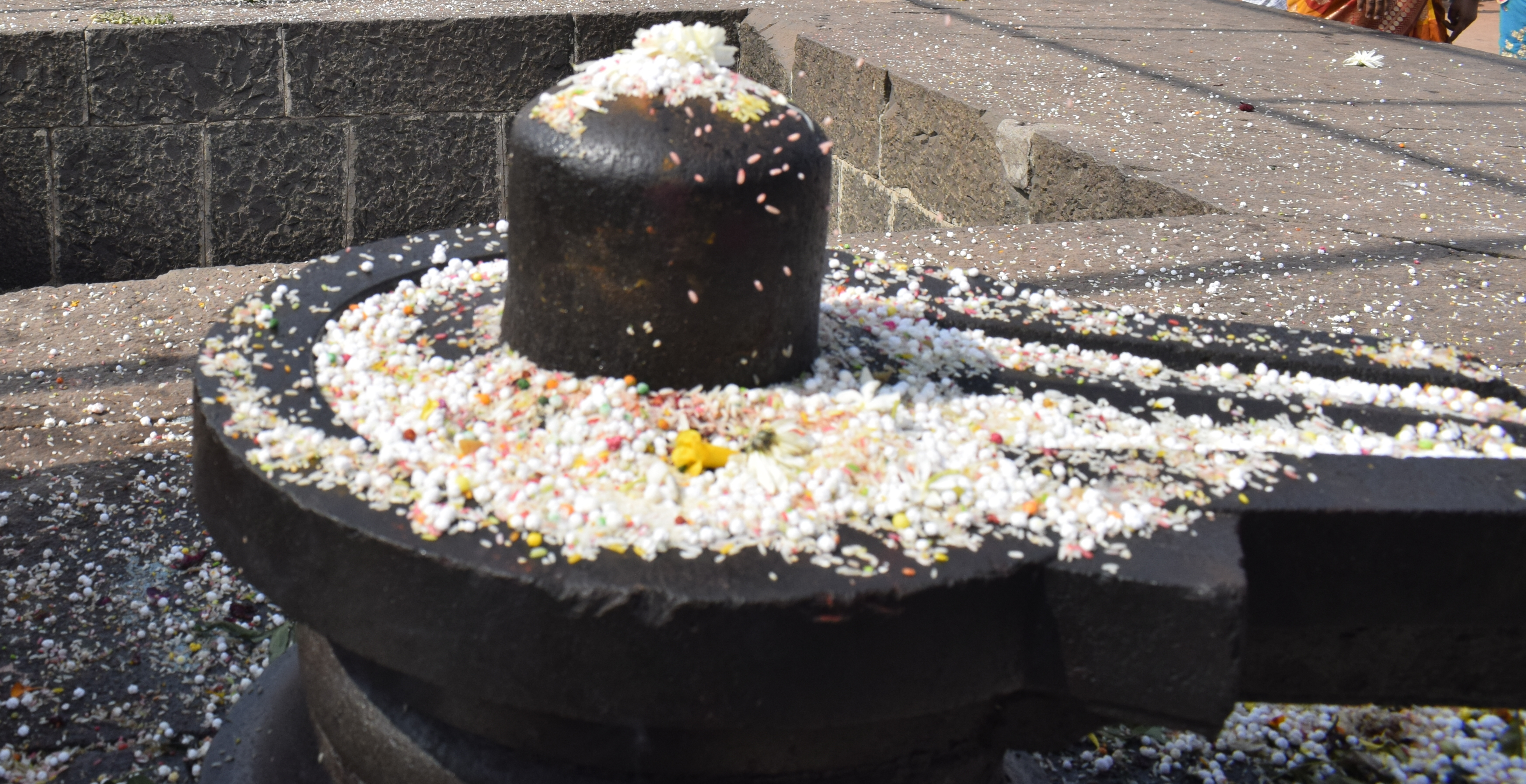 श्री सिद्धवंती लिंग